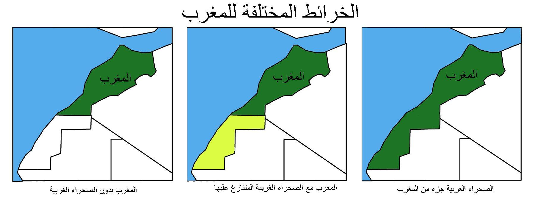 3 cartes du maroc en arabe traduite de la version espagnole - الخرائط الثلاثة للمغرب مترجمة من النسخة الأسبانية